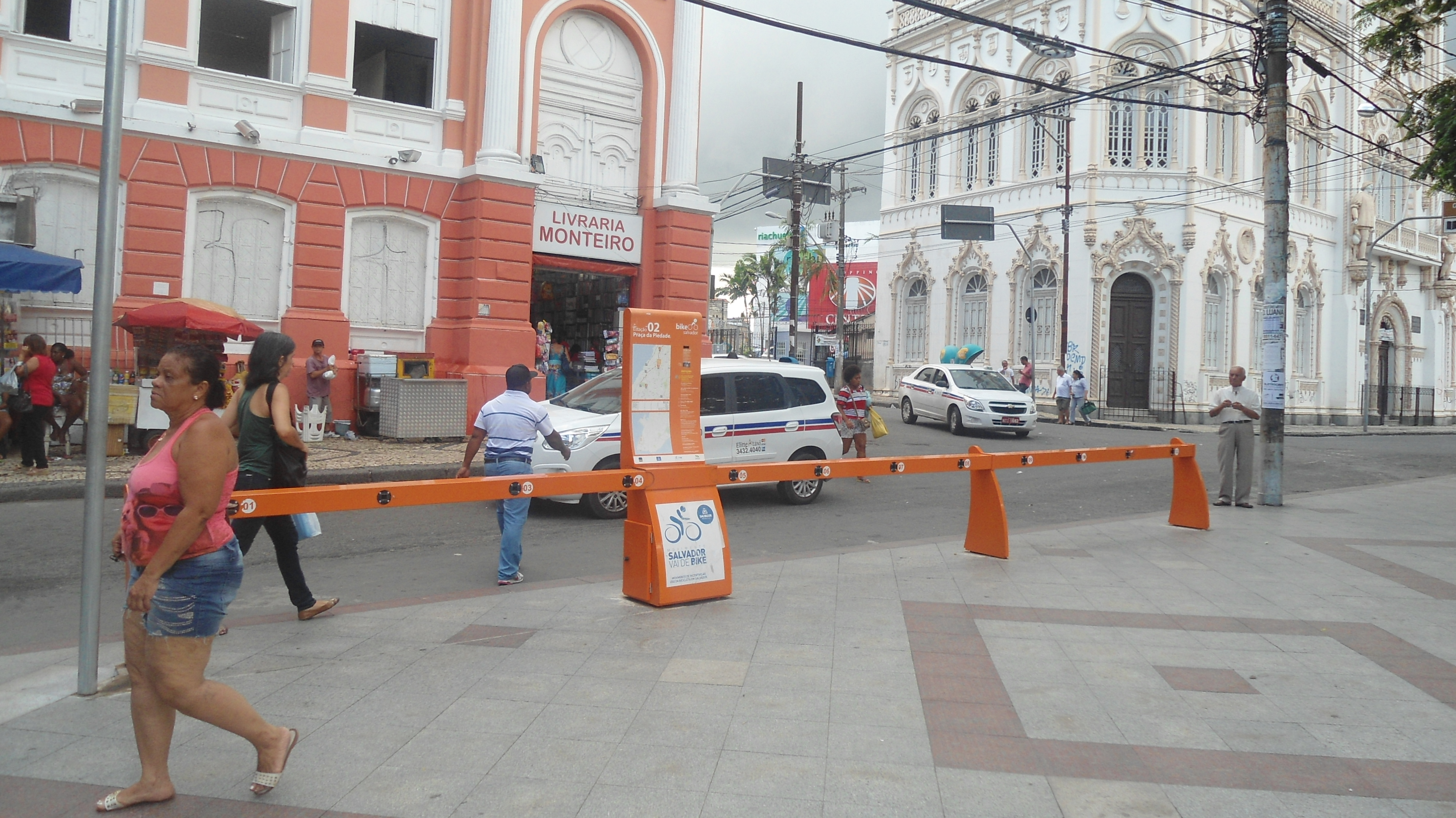 Foto tirada em janeiro de 2014 em Salvador, Bahia, durante mapeamento da cidade no OpenStreetMap pelo Wikiday.